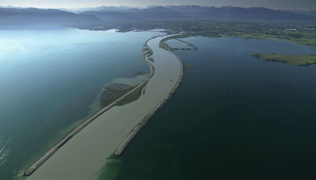 Der Alpenrhein mündet in den Bodensee